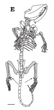 Maotherium skeleton